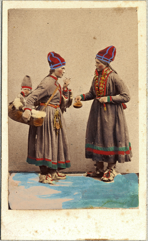 Dräktdockor. Samiska kvinnor från Åsele, Lappland. Handkolorerad.